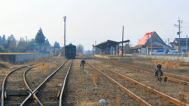 JR豊肥本線宮地駅 構内 写真奥が熊本駅方面、手前が大分駅方面。右側のオレンジ色の屋根の建物が駅舎。 撮影者/著者/著作権保有者 : MK Products (本人がアップロード) 撮影日 : 2007/02/04 宮地駅用にアップロードした画像です。良い画像があれば別の画像に変えてください。